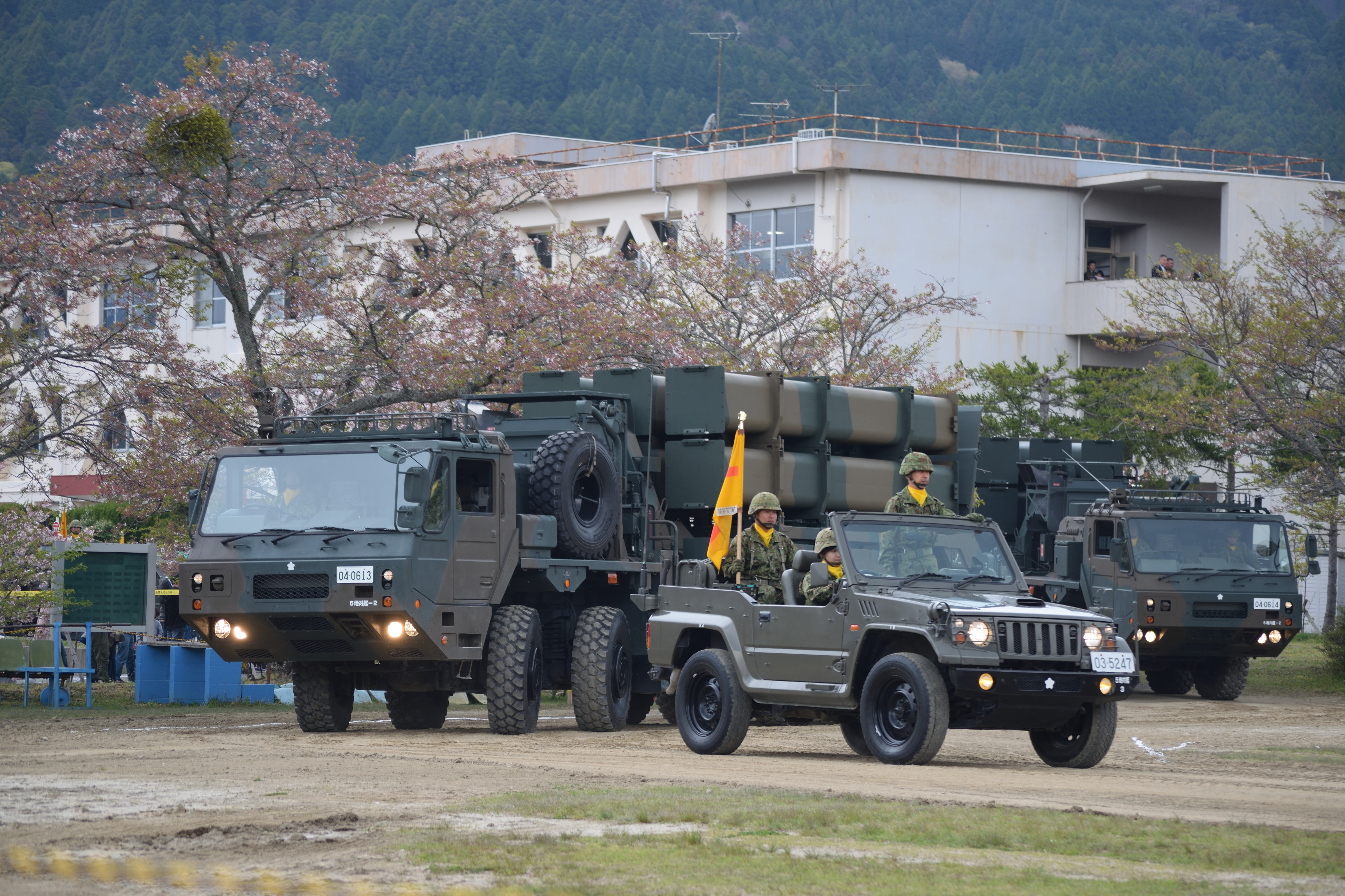 湯布院駐屯地記念式典での観閲行進（12式地対艦誘導弾） Nikon D3300